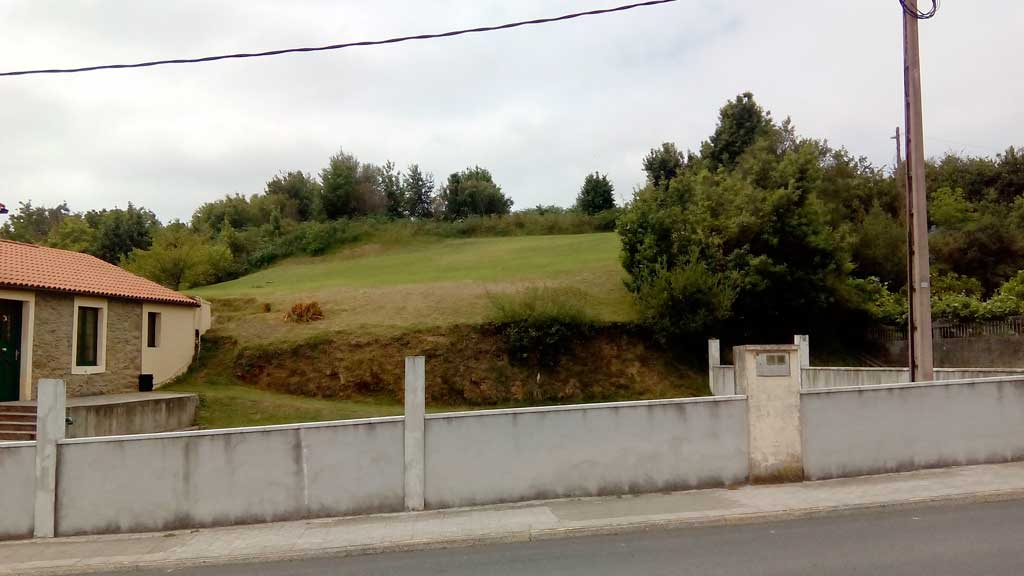 Vista do castro das Pías, O Cruceiro, Fene.